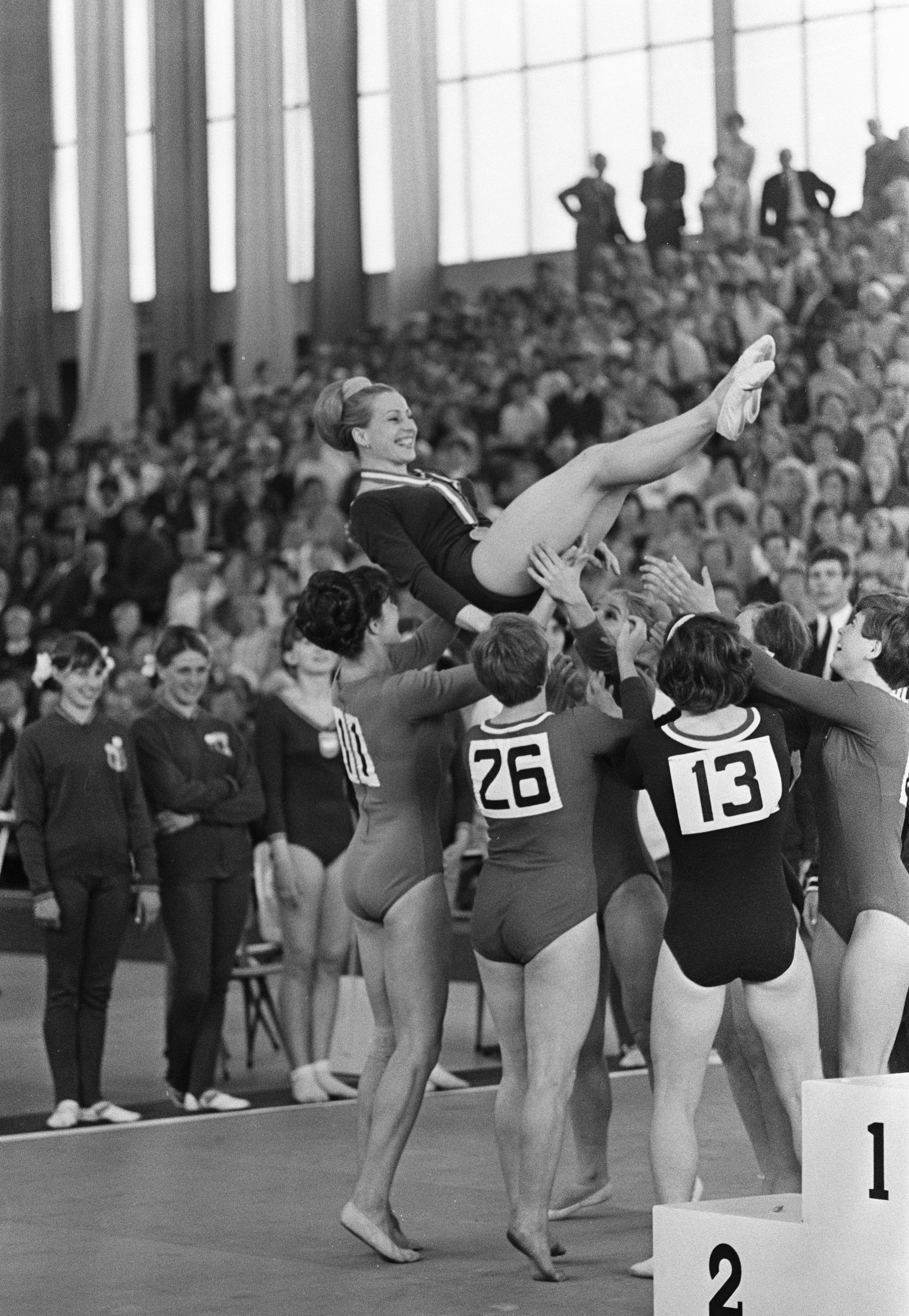 Věra Čáslavská and the Czech team at the European Championships